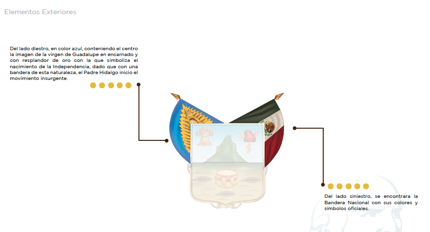 Esquema de los elementos exteriores del Escudo de Hidalgo